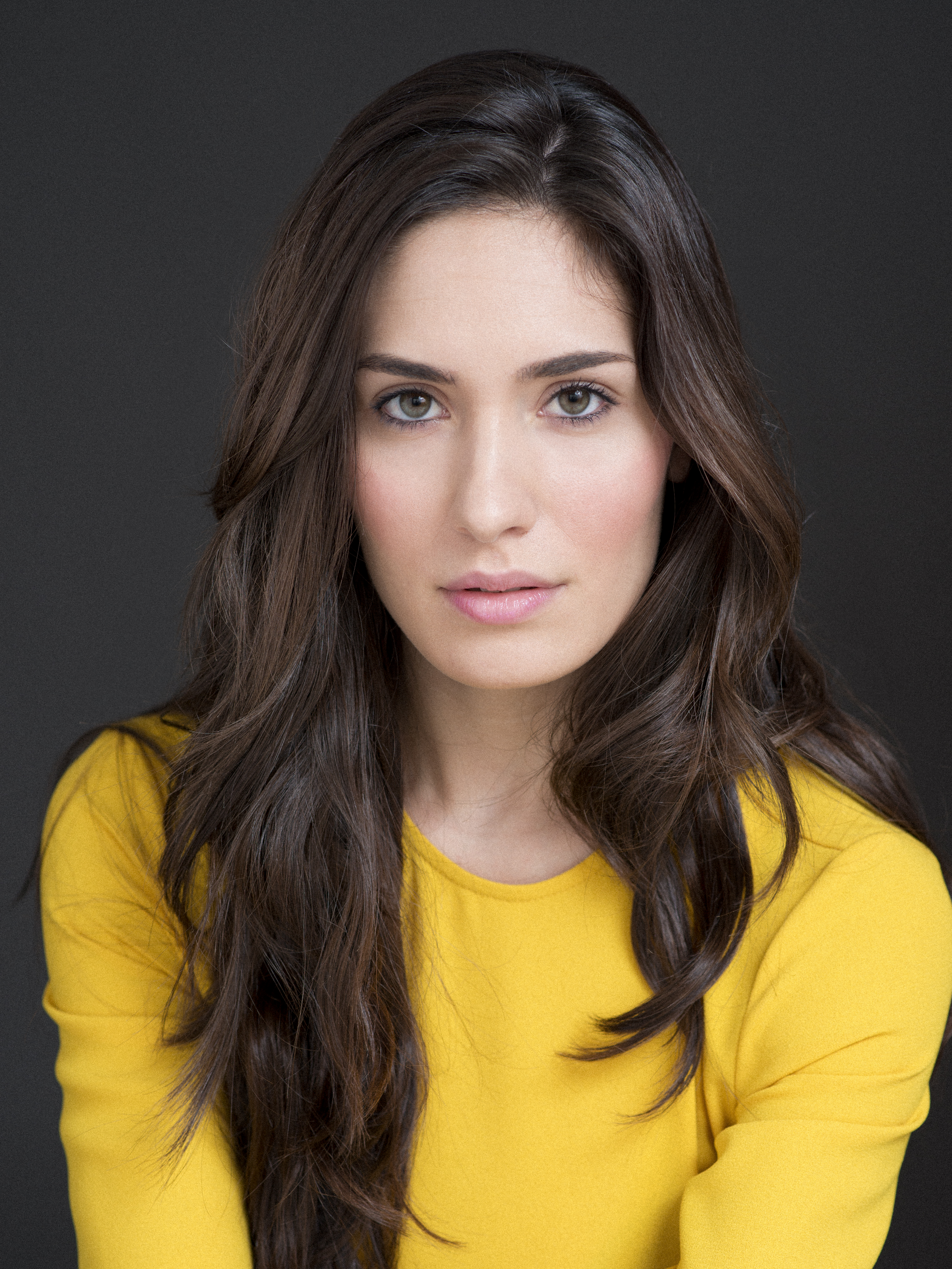 Yara Puebla